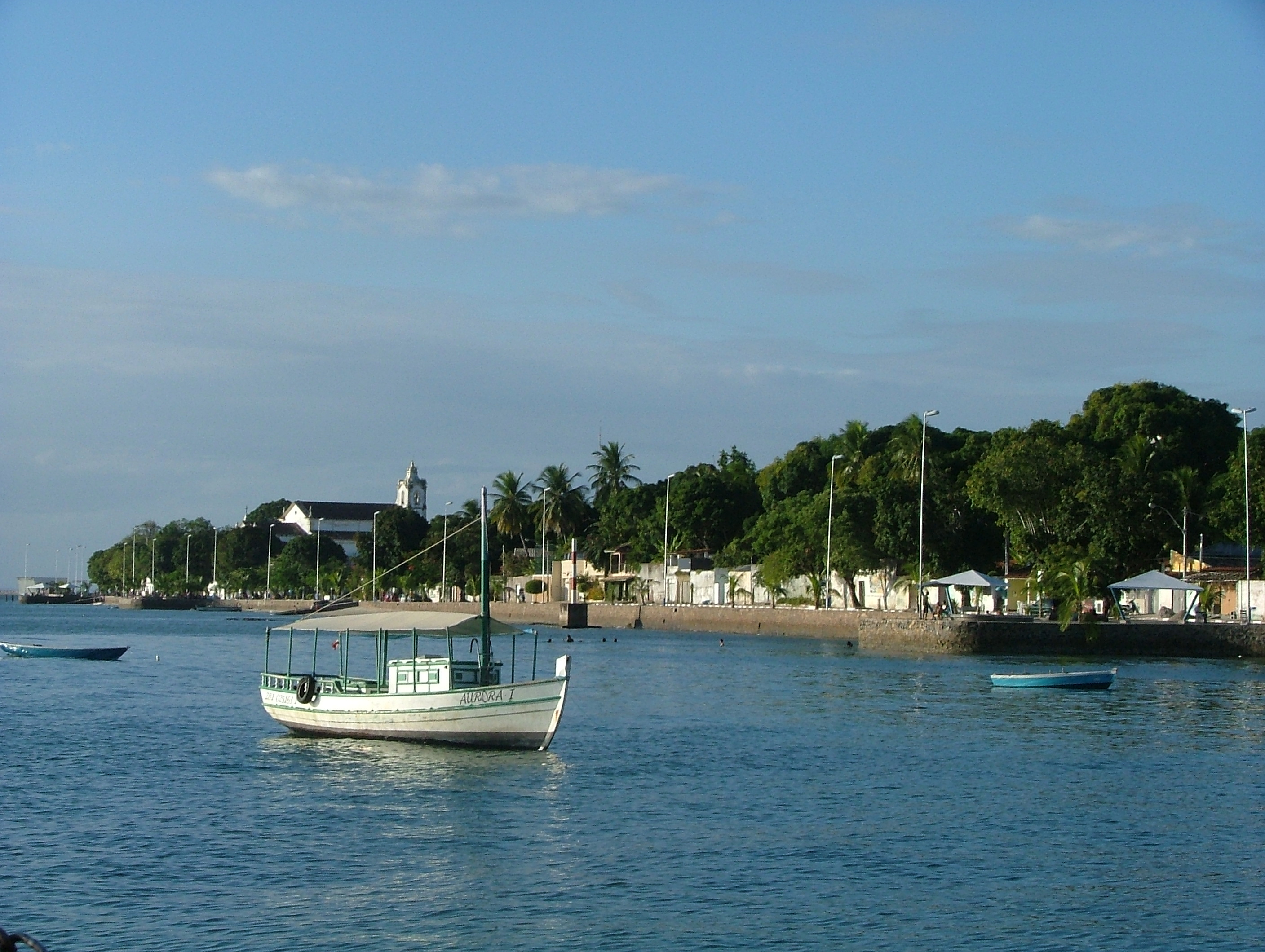 Ilha de Itaparica, Bahia de Todos os Santos, Brazil